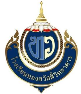 ตรารร.ทว.